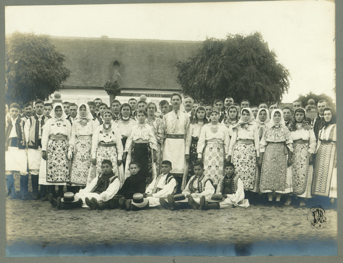 Adler - Corul din Belinţ, condus de Miclea Nistor